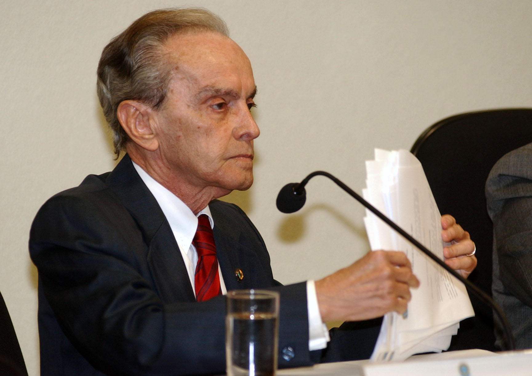 Senador Jefferson Péres (PDT-AM), durante leitura de relatório que pede a cassação do senador Renan Calheiros (PMDB-AL)